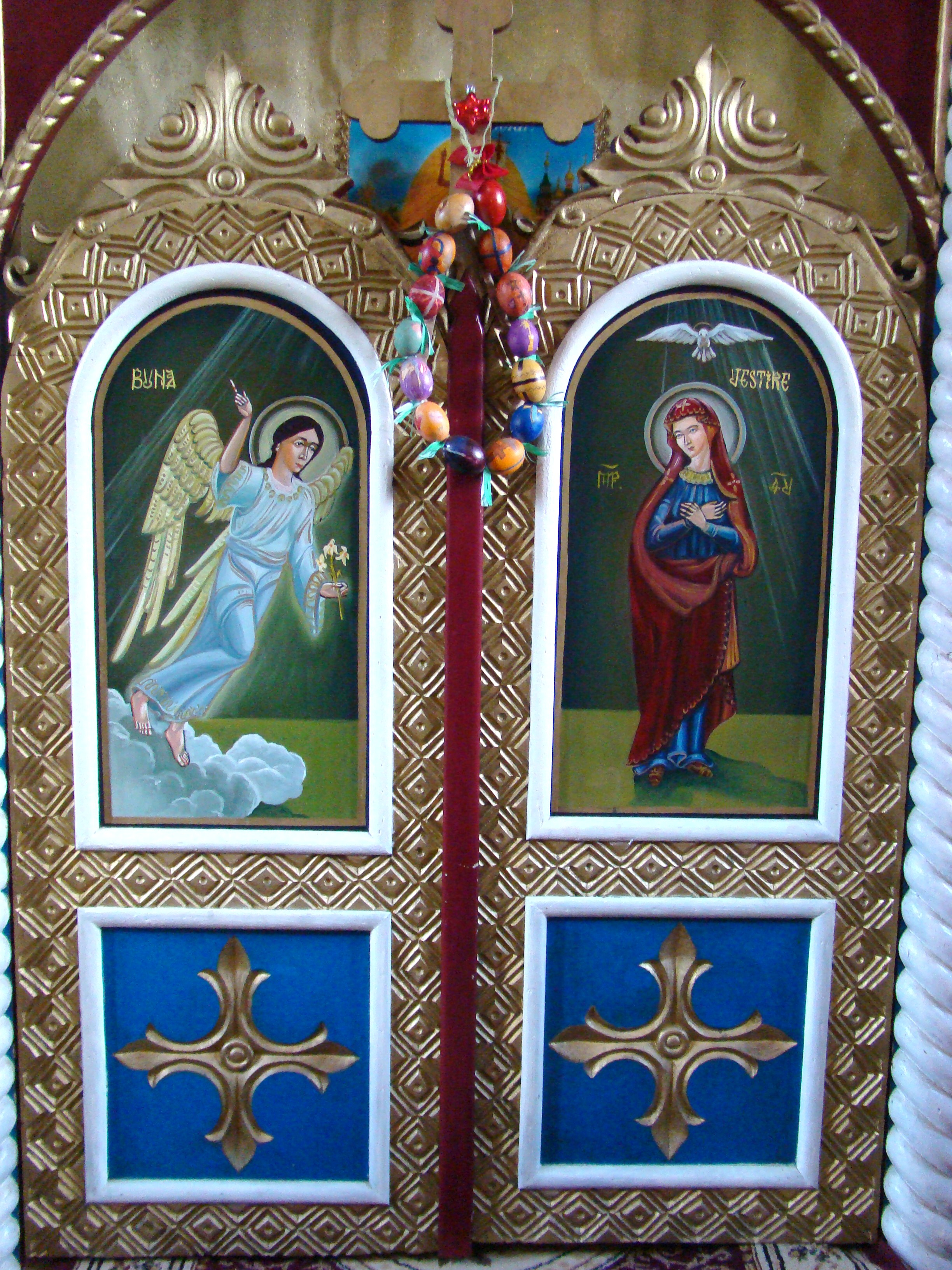 Biserica „Sfinții Arhangheli Mihail și Gavriil”, sat FEIURDENI; comuna CHINTENI, județul Cluj